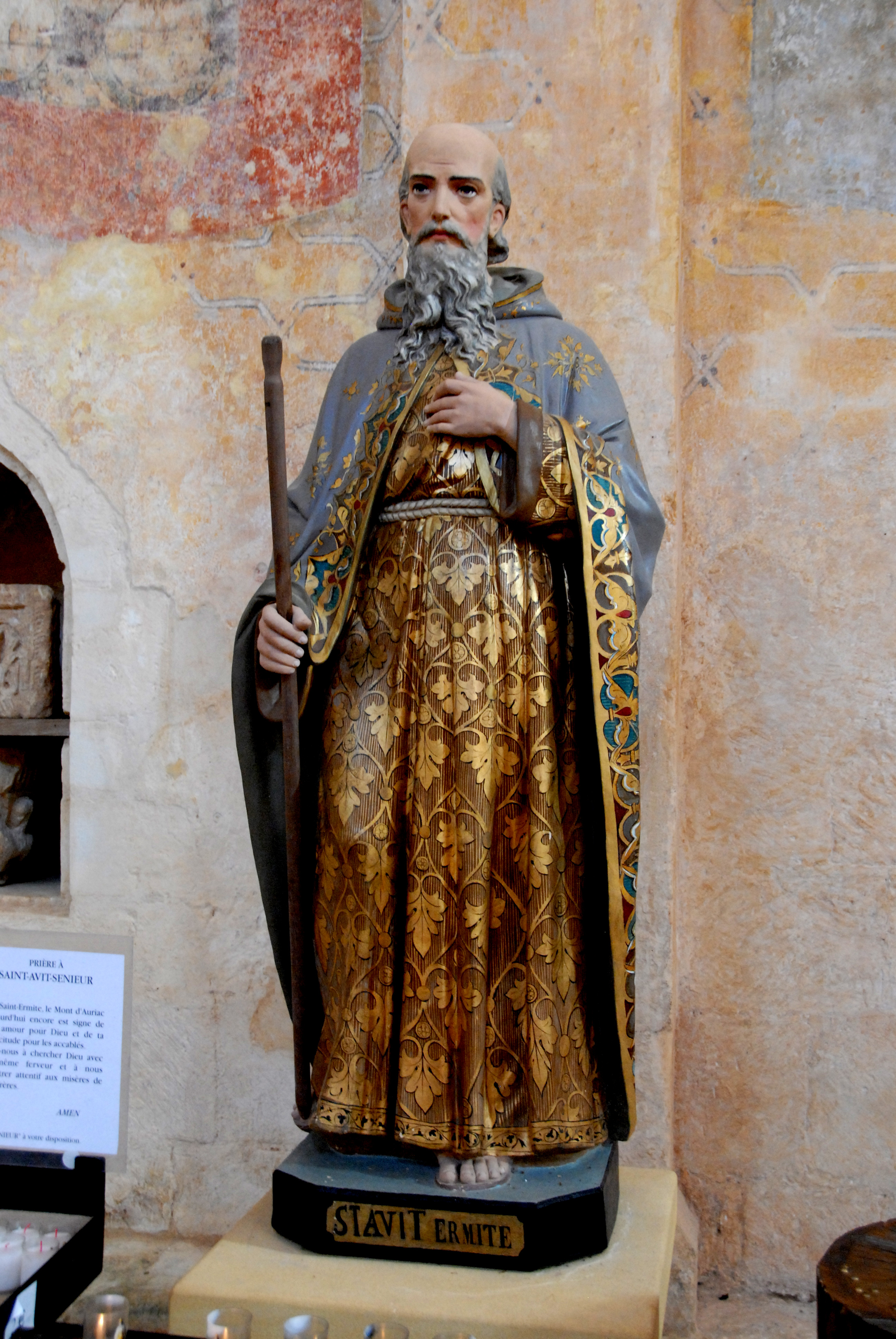 St.-Avit-Sénieur, Skulptur